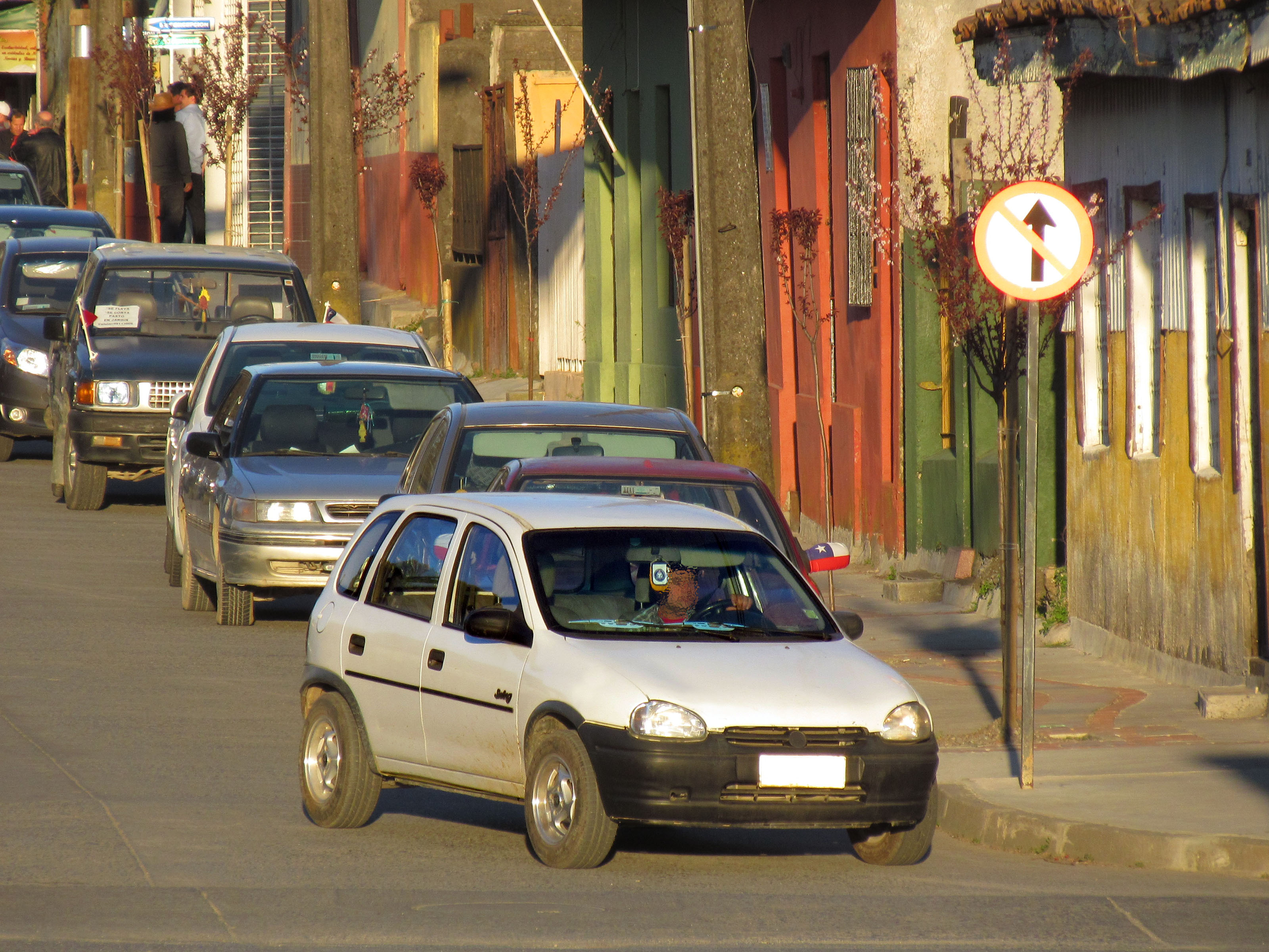 Opel Corsa 1.4i Swing 1993